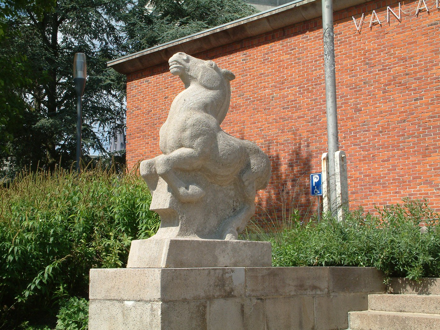 Van Abbemuseum, entree oudbouw, kunstwerk Paarden (1 van 2) (1936) van John Raedecker